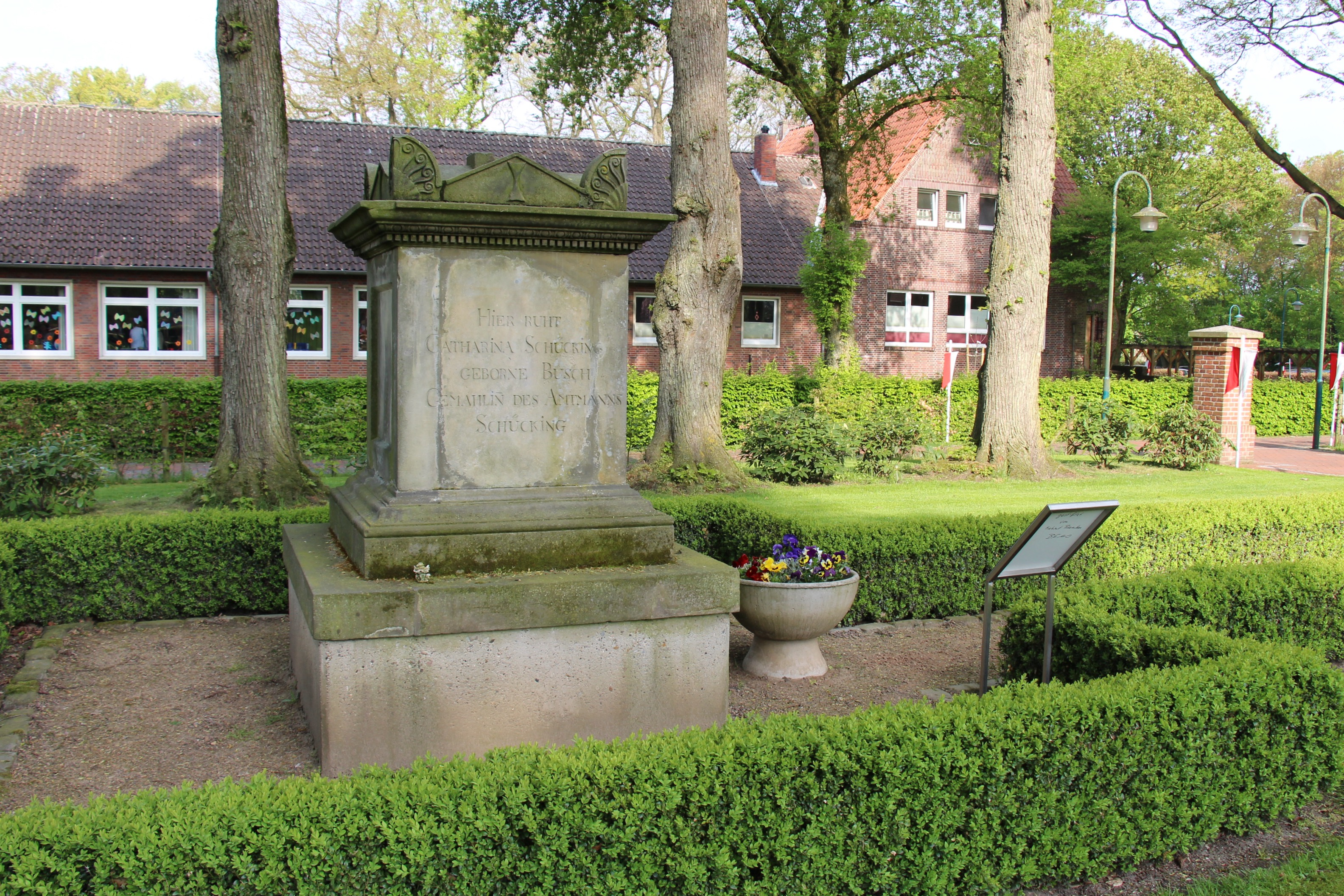 Denkmal der Dichterin Katharina Sybilla Schücking auf dem Friedhof in Gehlenberg